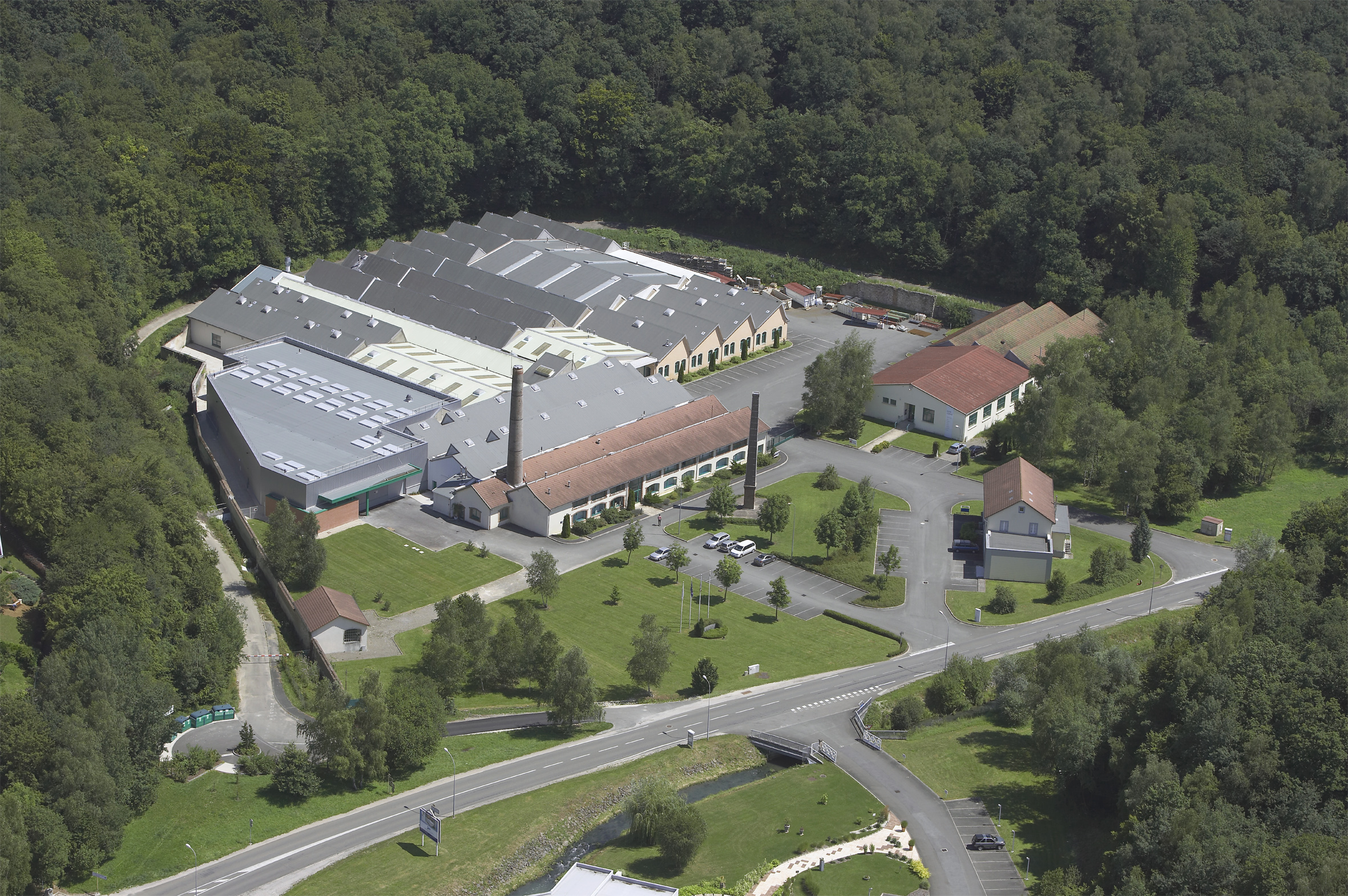 Vue aérienne des usines Cristel à Fesches-le-Châtel